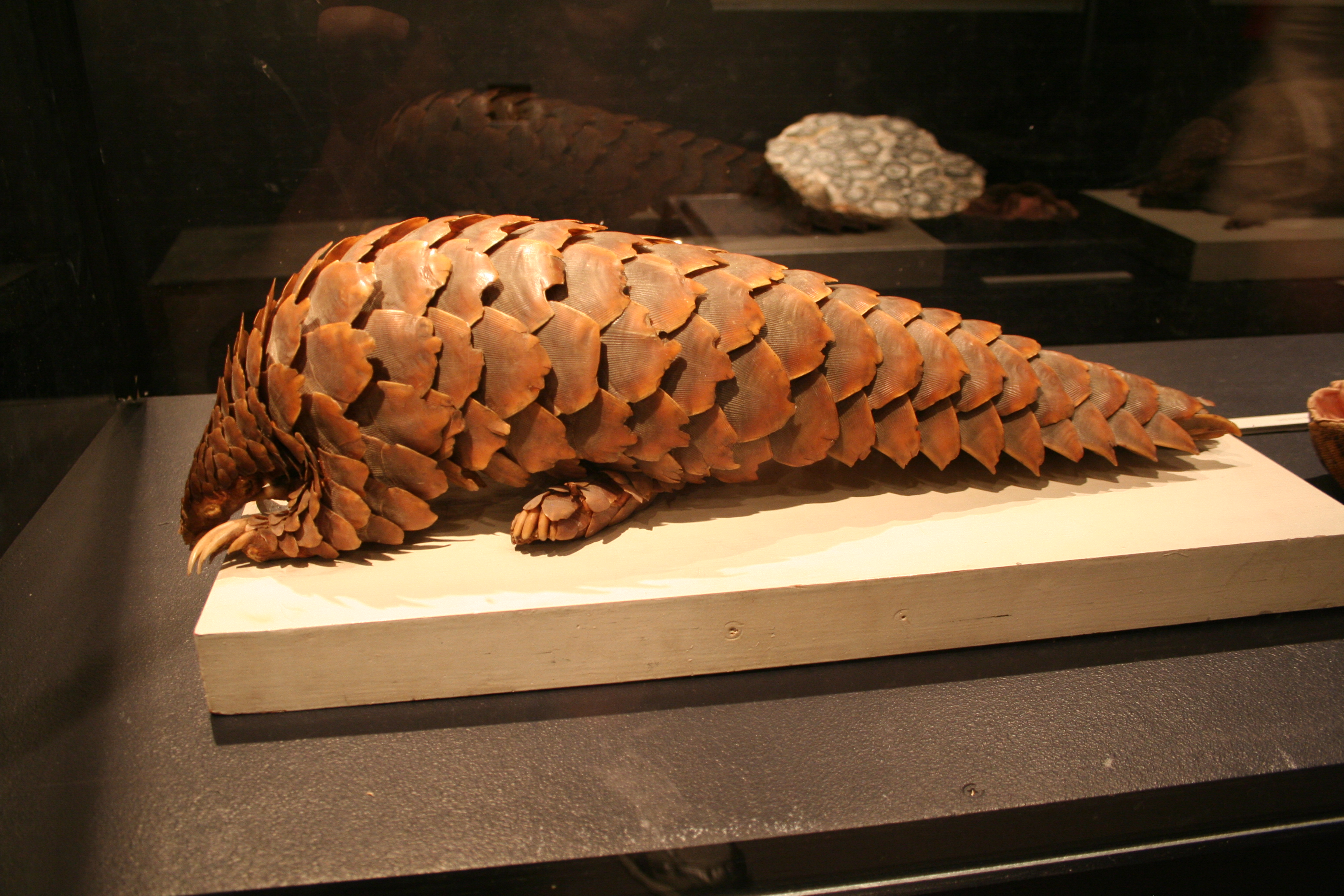 Manis temminckii eli Muurahaiskäpy, näyttelyesine Keski-Suomen luontomuseo, Jyväskylä, 2013